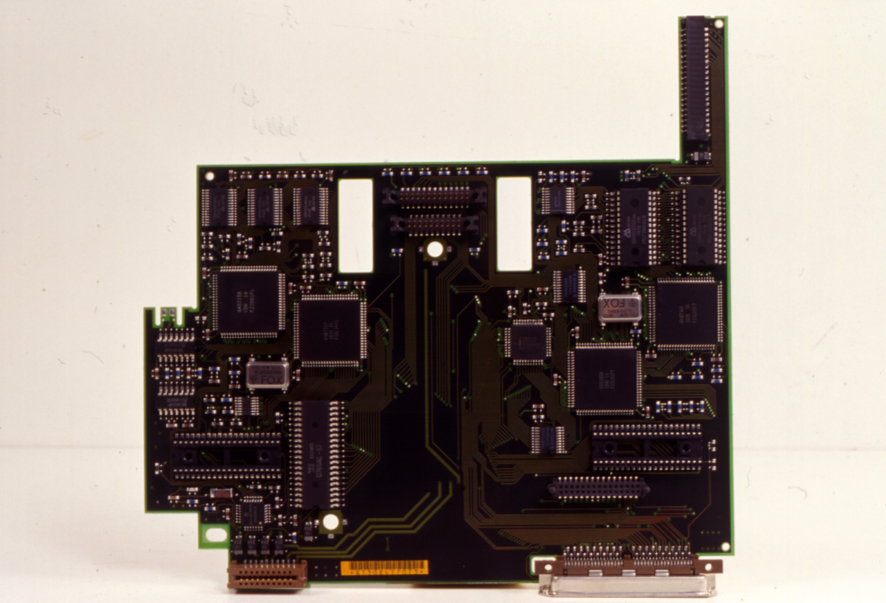 L'oggetto, meglio conosciuto come matherboard, consiste in una piastra di bachelite con circuito stampato multistrato il cui tracciato è visibile su entrambi i lati Sulla piastra sono montati molteplici componenti elettronici quali microprocessori, circuiti integrati, resistenze, condensatori, memorie. Sono presenti anche connettori per l'aggiunta di altri componenti e per l'allacciamento ad altre unità del sistema. Funzione La sua funzione principale è di interfacciarsi ai vari componenti principali e collegarli tra loro, gestire la circuteria dei bus di espansione e le interfacce verso l'esterno; inoltre gestisce la trasmissione e la temporizzazione corretta dei vari segnali tra i componenti. Modalità d'uso Il dispositivo viene utilizzato ll'interno del PC IBM 5140. Notizie storico-critiche Nel 1986 esce il primo computer portatile della IBM, il 5140: ha una meccanica invidiabile, modifica la forma del cabinet, sollevando la parte centrale insieme al monitor LCD: quest'ultimo, stretto e allungato, si stacca con un semplice clic. Anche la tastiera è estraibile e intercambiabile, e la parte posteriore del 5140 può alloggiare una stampante che prosegue, nella forma, la linea del computer. Da questa incredibile versatilità deriva il soprannome "Convertible"